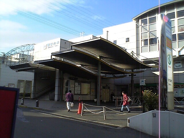 瓢箪山駅